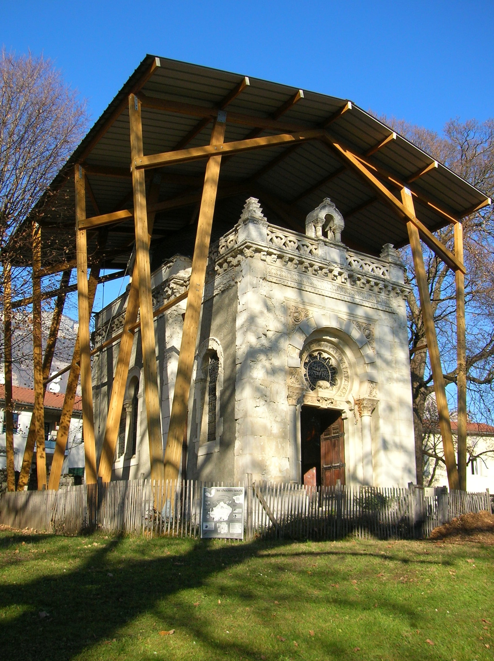 Chapelle du Maréchal Randon. Saint-Ismier, Isère, Rhone-Alpes, France.